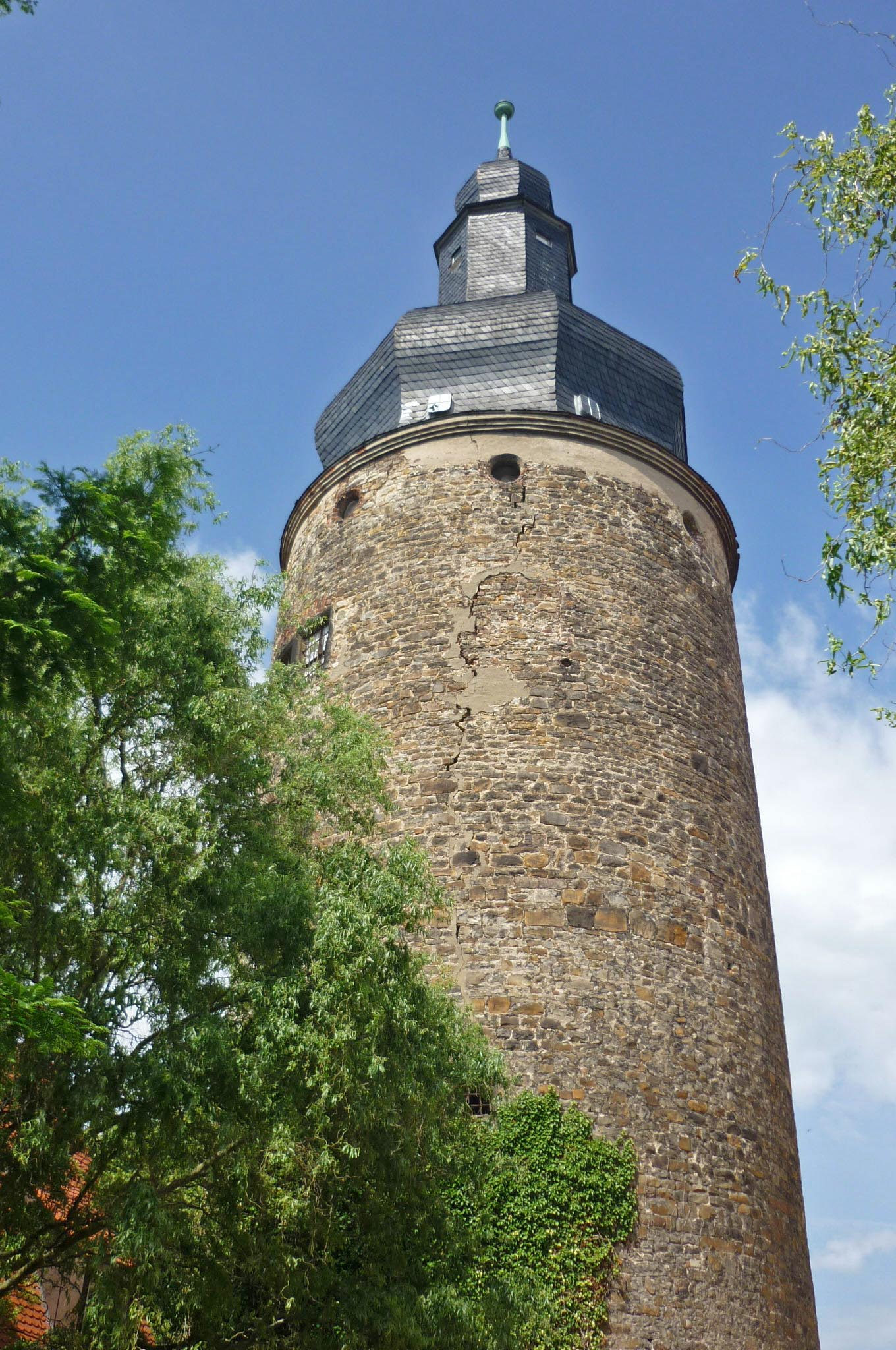 Bergfried der Wasserburg Gommern